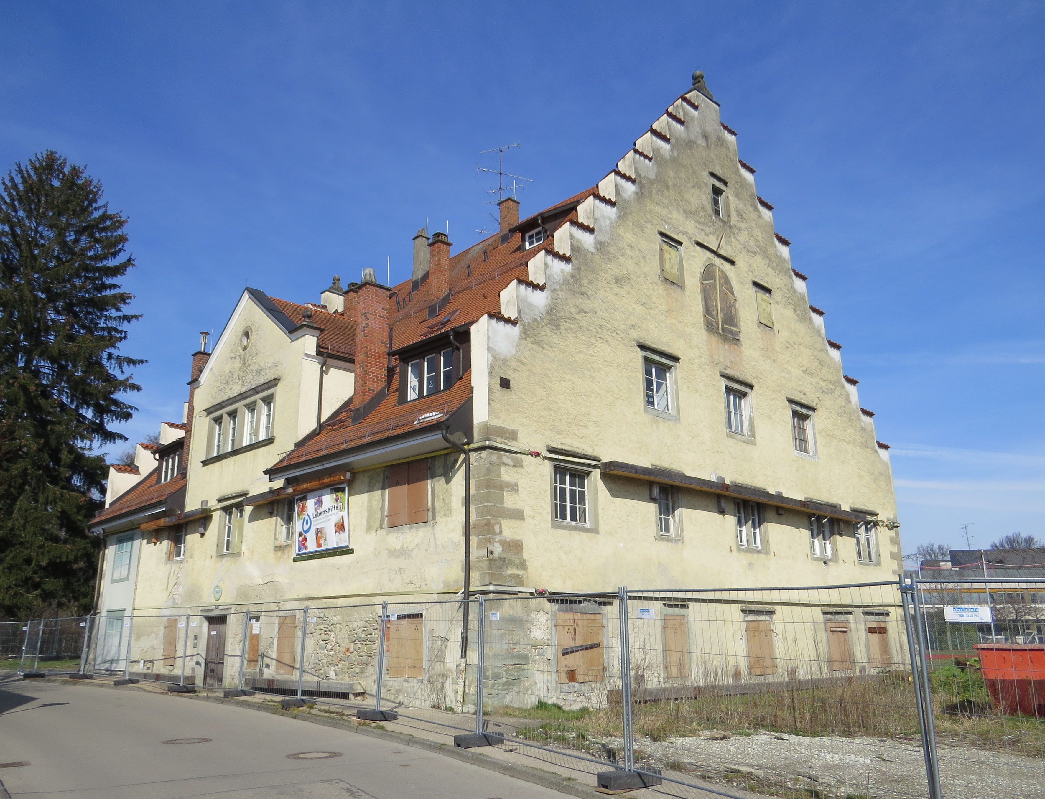 Rainhaus in Lindau (Bodensee)